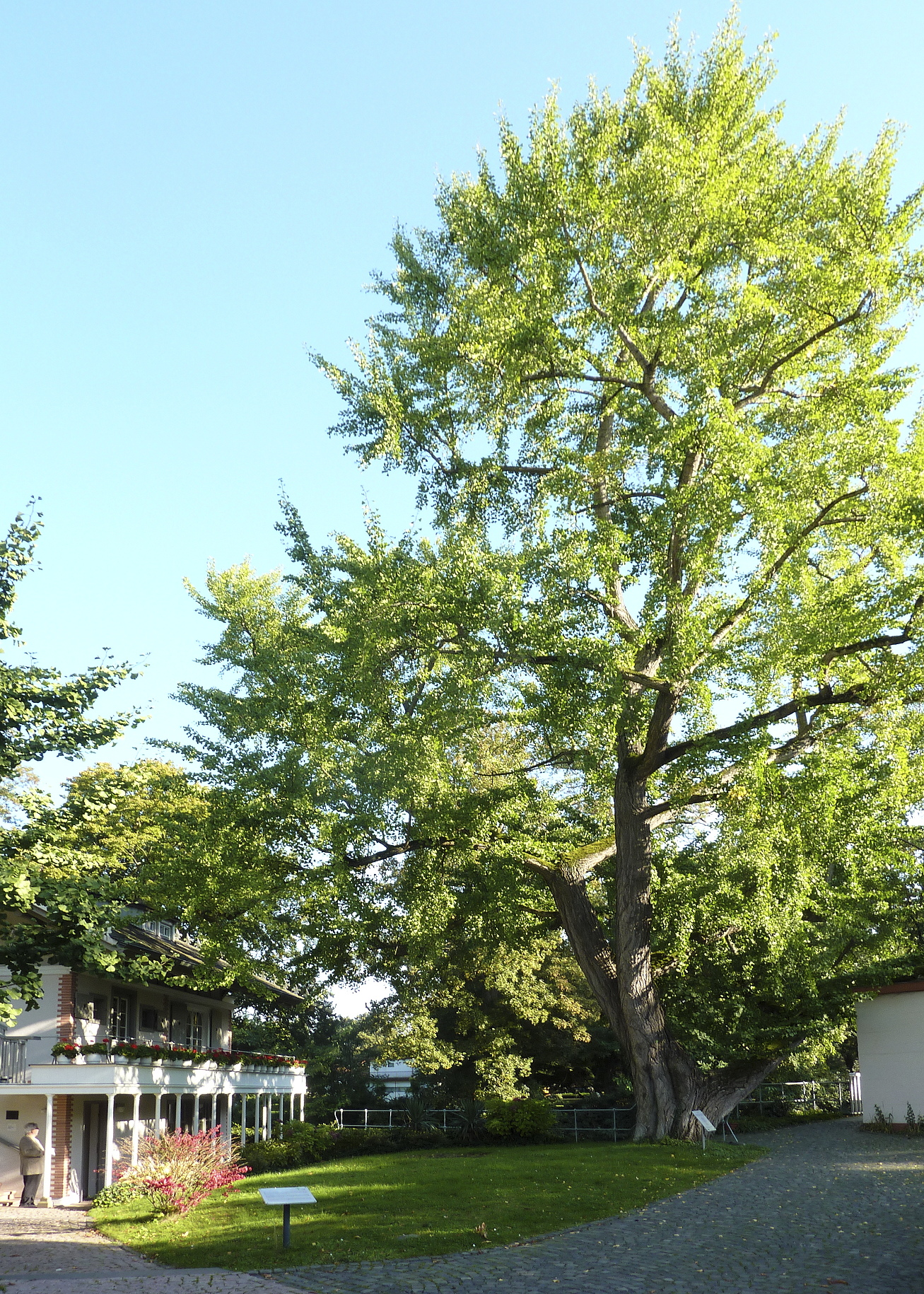 Der Ginkgo in Rödelheim ist ein im Jahr 1750 gepflanztes Exemplar der aus China stammenden Baumart Ginkgo biloba. Der rund 18 Meter hohe Einzelbaum steht im Stadtteil Rödelheim der Stadt Frankfurt am Main, auf dem Grundstück des Petrihauses am Ufer des Flusses Nidda. Dieser Ginkgobaum gilt als das älteste Exemplar in Deutschland und hat den Status eines Naturdenkmals.